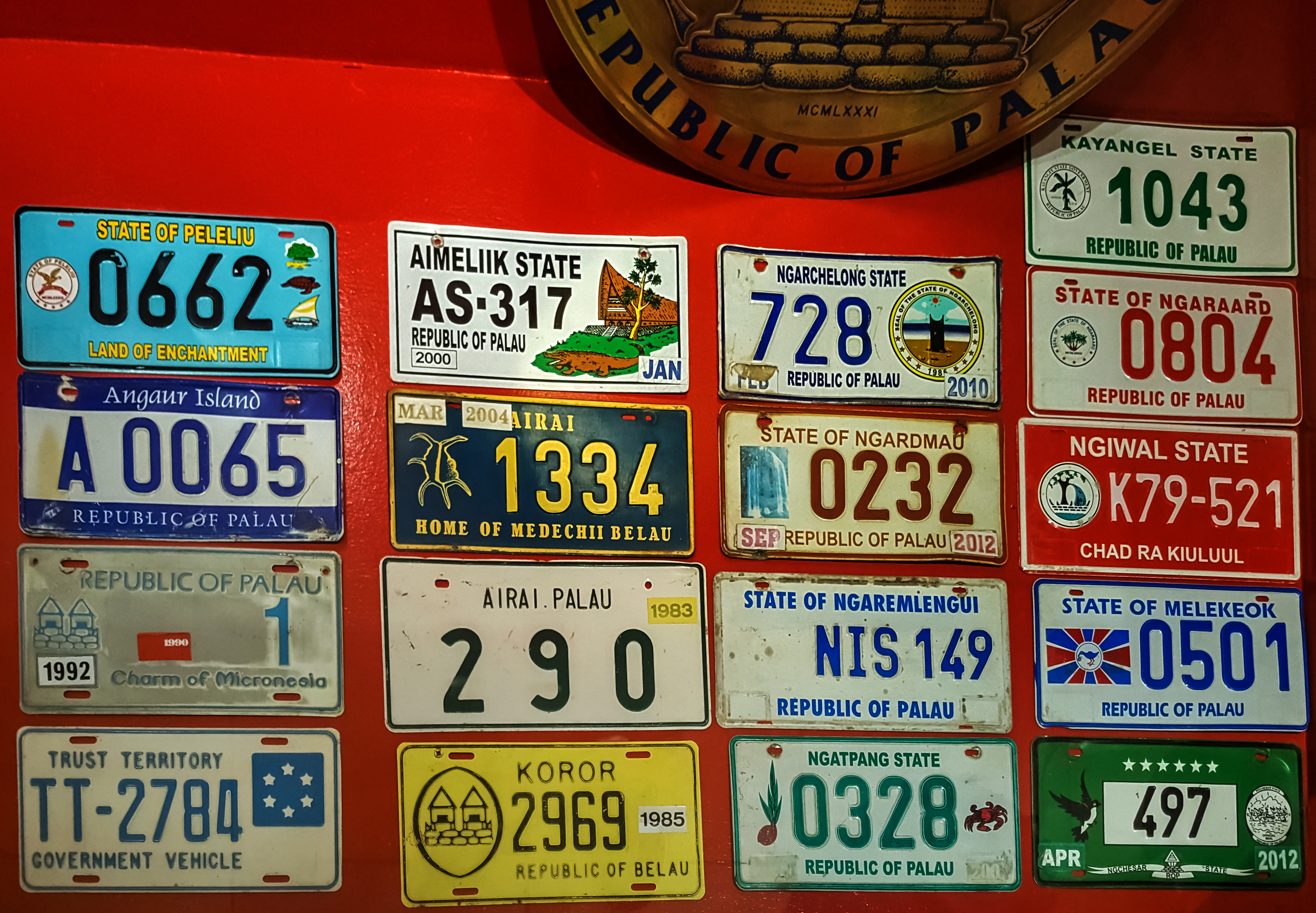 Exposition of a collection of licence plates from Palau in the Etpison Museum, Koror, Palau